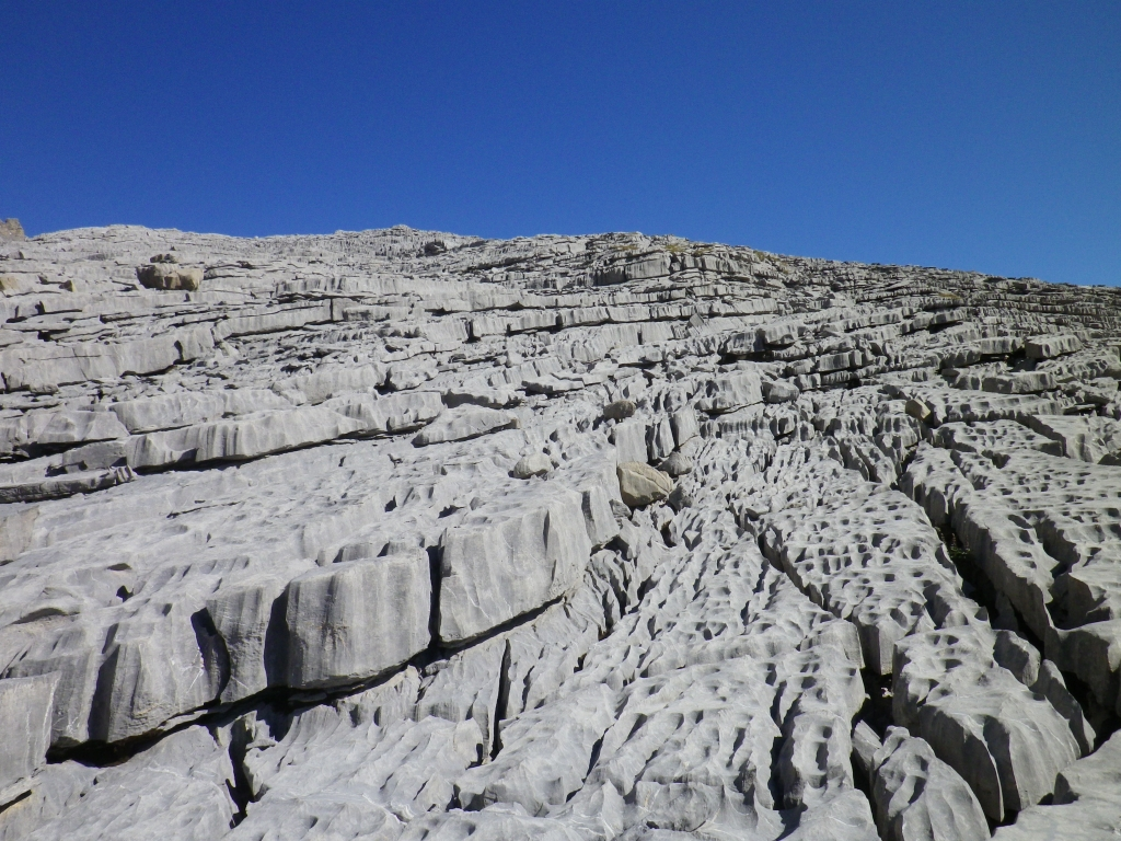 Karstfeld auf dem Weg vom Tannenee zum Rotsandnollen